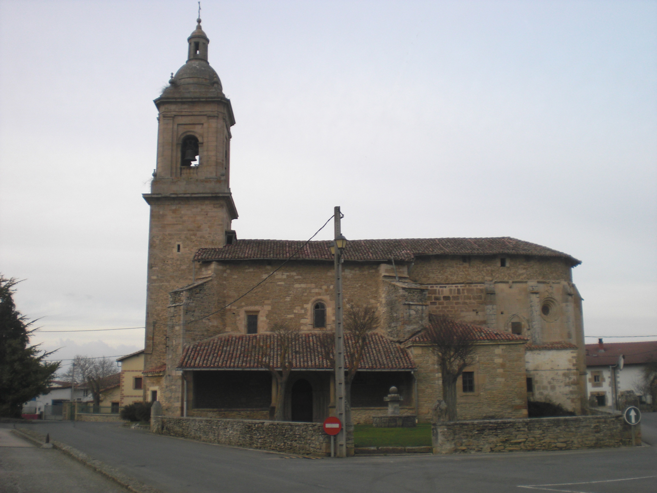 Oreitiako eliza.